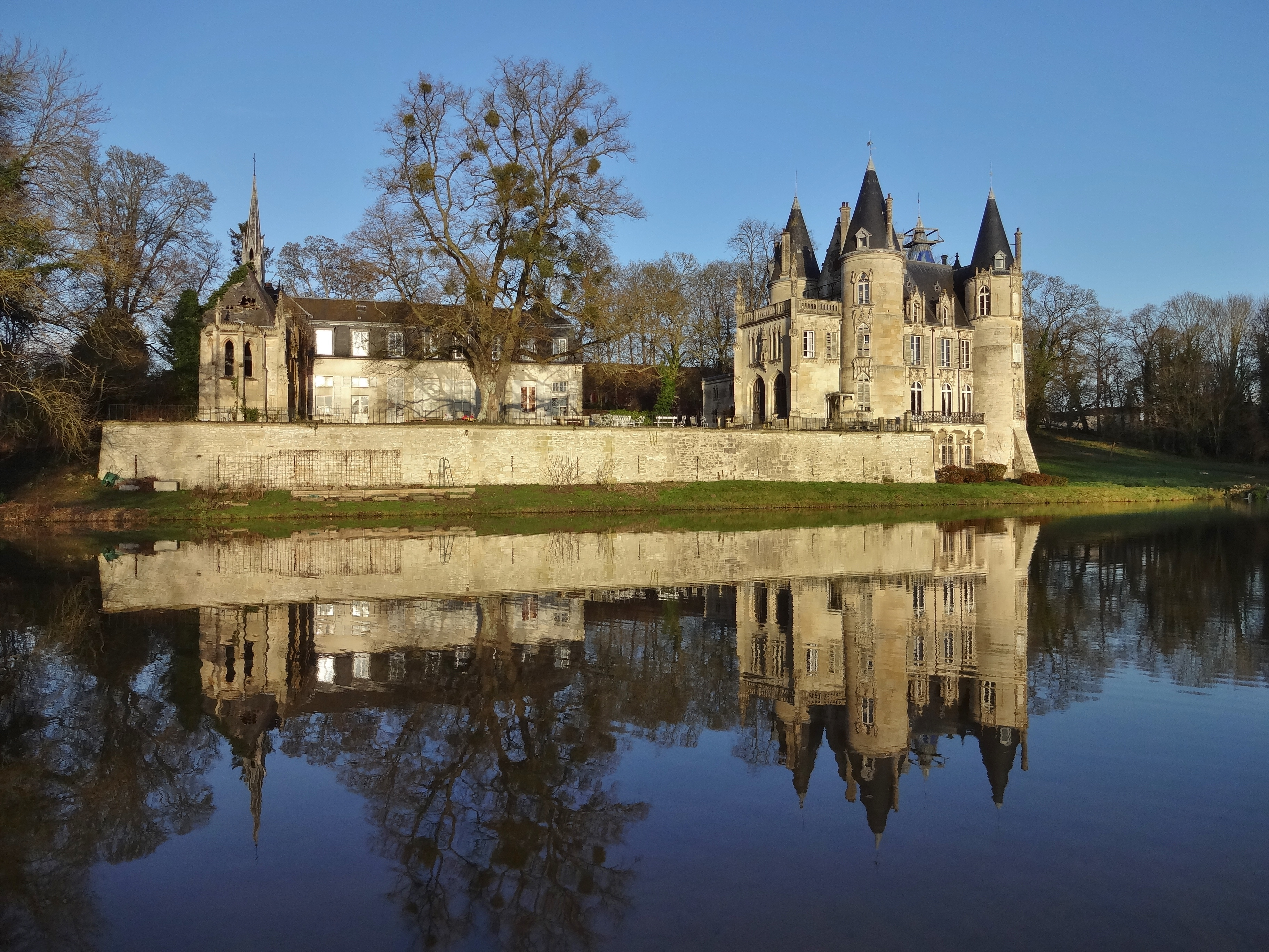 Le château de Mont-l’Évêque dans la lumière du soir, France.